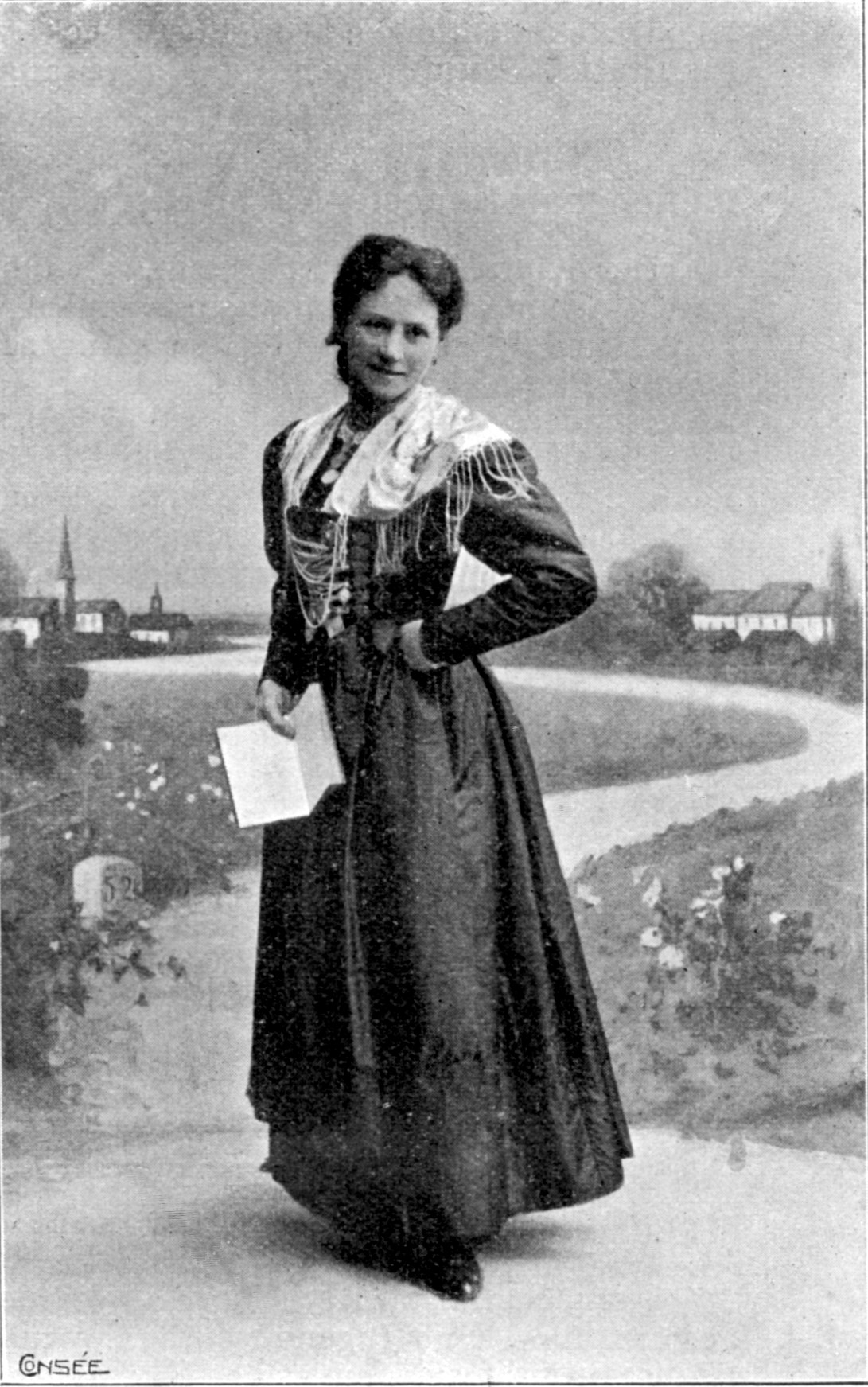 Fotografie der Dialektdichterin Elise Beck